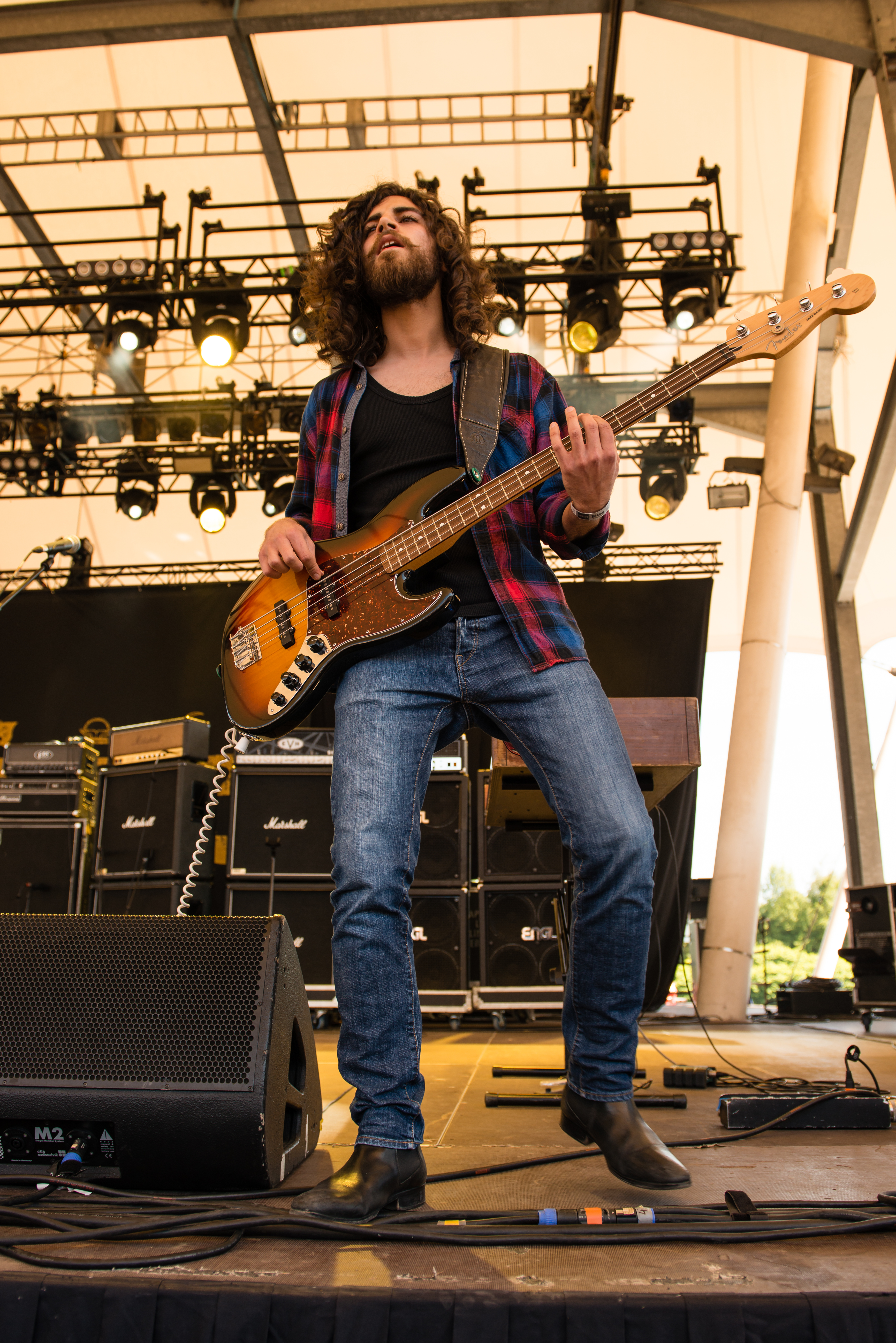 'Rock Hard Festival 2014 - Gelsenkirchen': 'Zodiac'